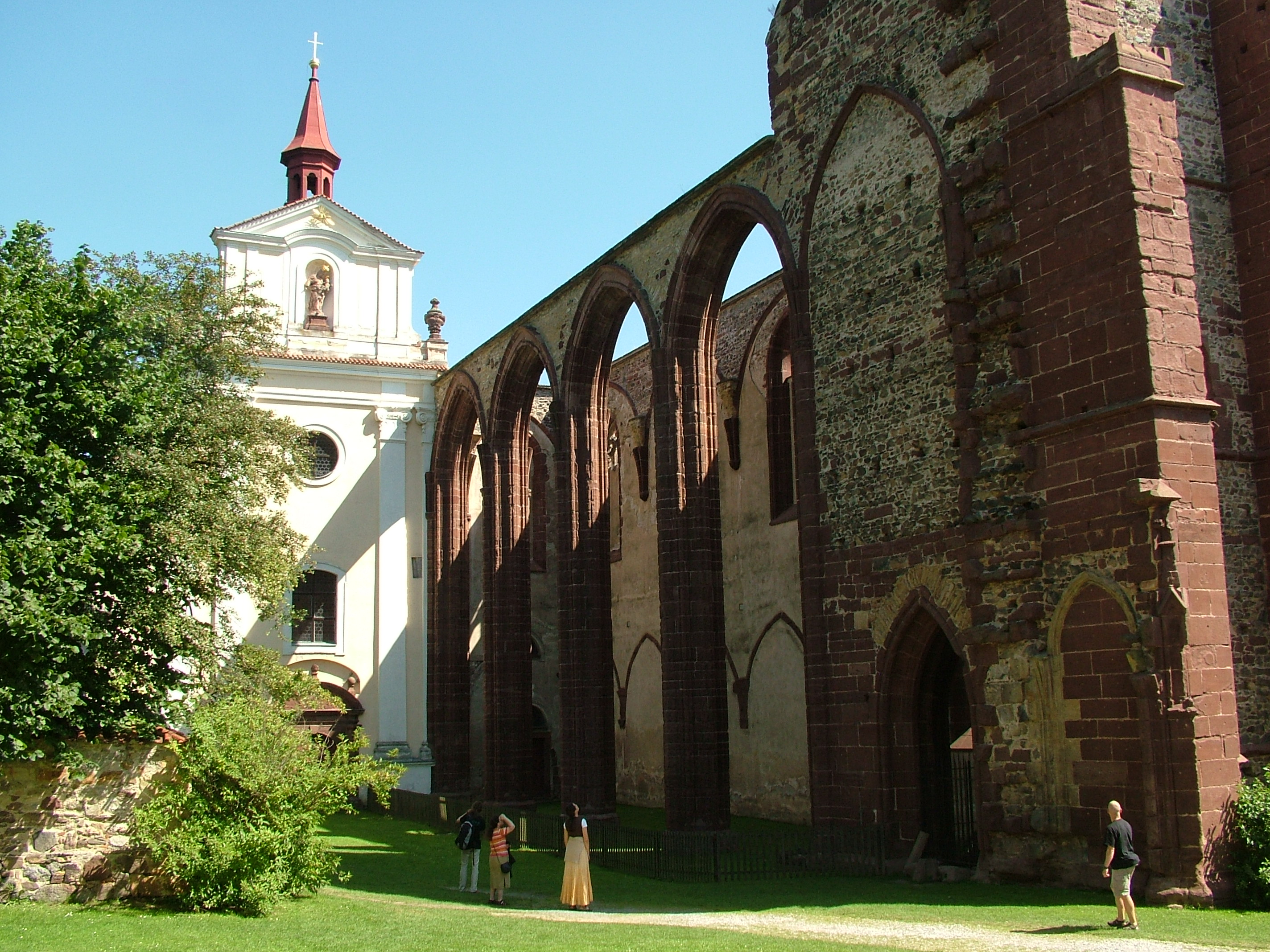 Sázavský klášter, později přestavěný na zámek, leží ve městečku Sázava nad stejnojmennou řekou. Nejstarší zmínky o klášteru sahají do roku 1032. U jeho zrodu stáli kníže Oldřich a svatý Prokop, tehdy poustevník, kolem něhož se zde tvořila skupina následovníků již asi od roku 1009. (Kloster Sázava) Sázavský klášter, později přestavěný na zámek, leží ve městečku Sázava nad stejnojmennou řekou. Nejstarší zmínky o klášteru sahají do roku 1032. U jeho zrodu stáli kníže Oldřich a svatý Prokop asi roku 1009.